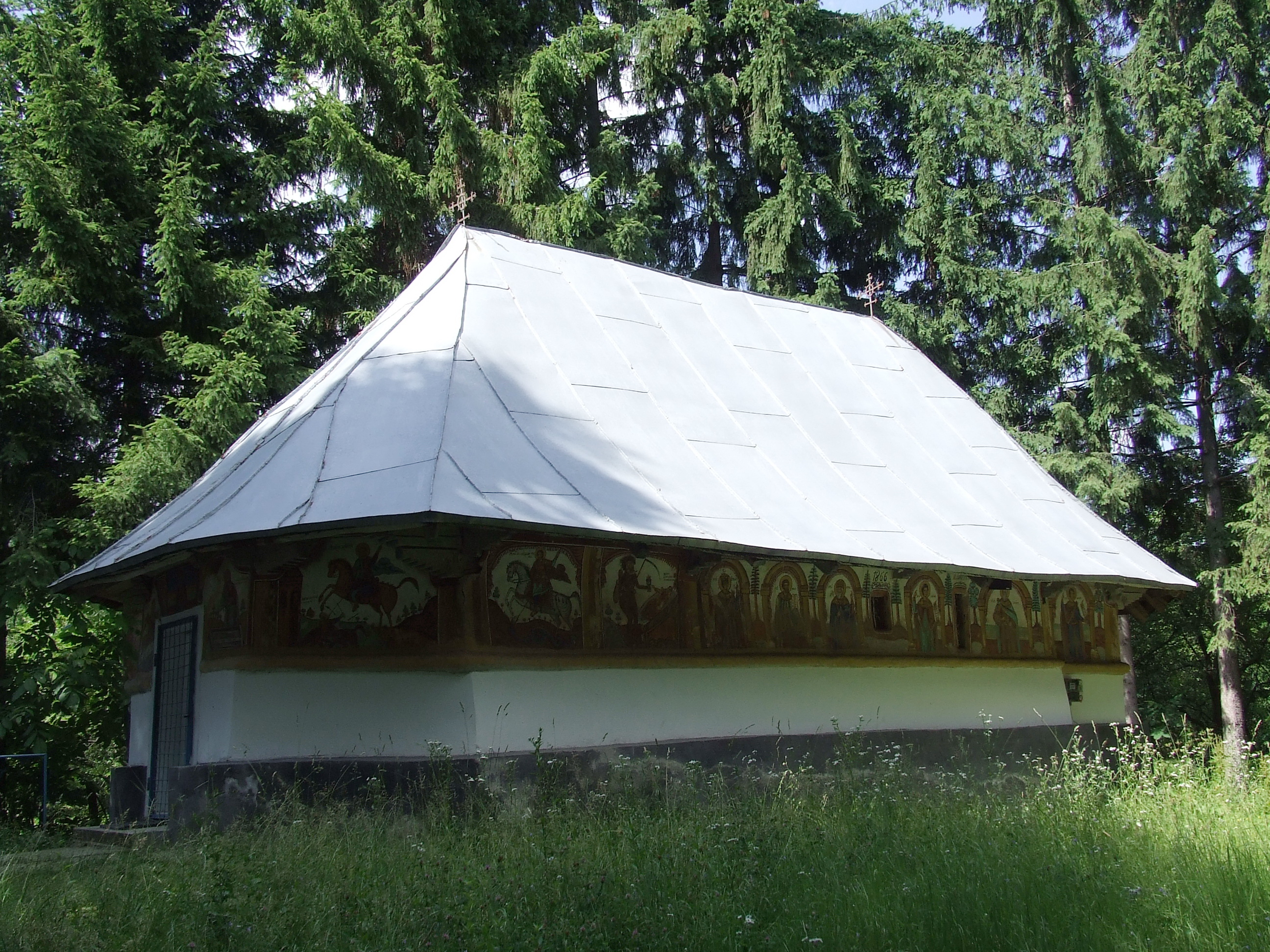 Biserica de lemn din Opătești, județul Vâlcea